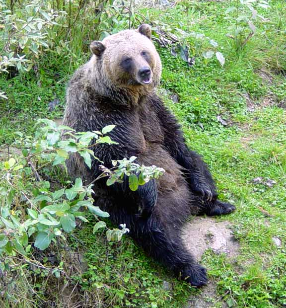 Grizz at rest